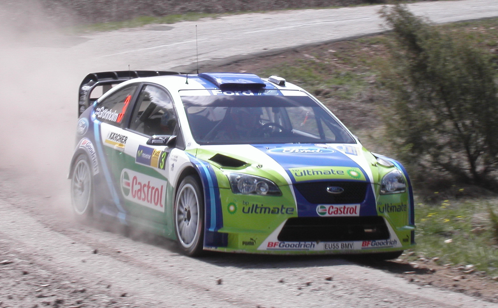 Grönholm, Rallye Catalunya 2006.